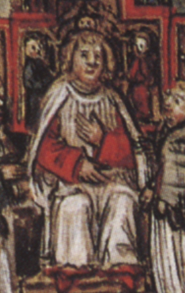 Konstanzer Bistumsstreit von 1474, abgebildet in Diebold Schillings Schweizer Bilderchronik, 1513. Zentralbibliothek Luzern. Otto von Sonnenberg